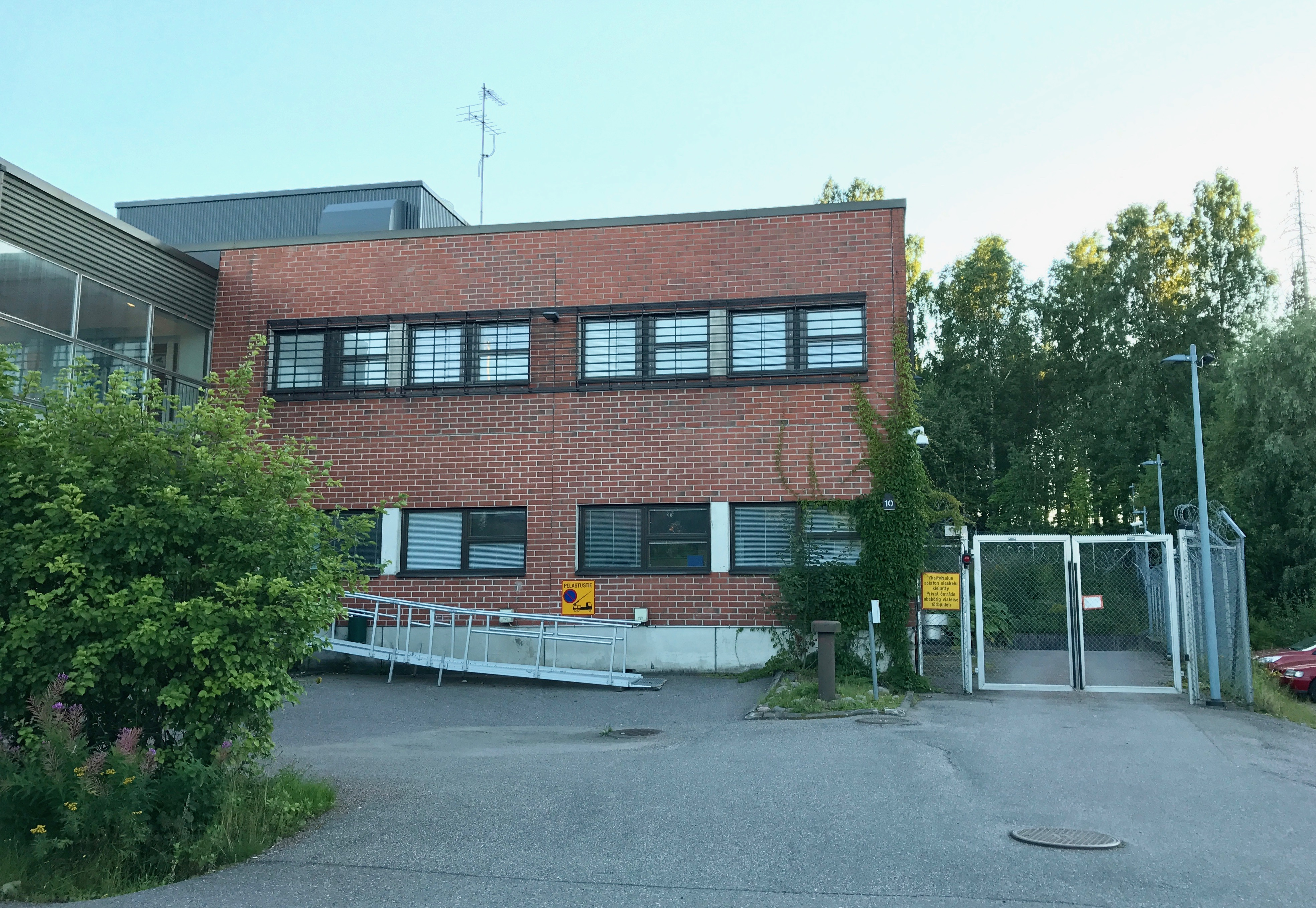 Helsingin säilöönottoyksikkö osoitteessa Niittylänpolku 10, Helsinki.